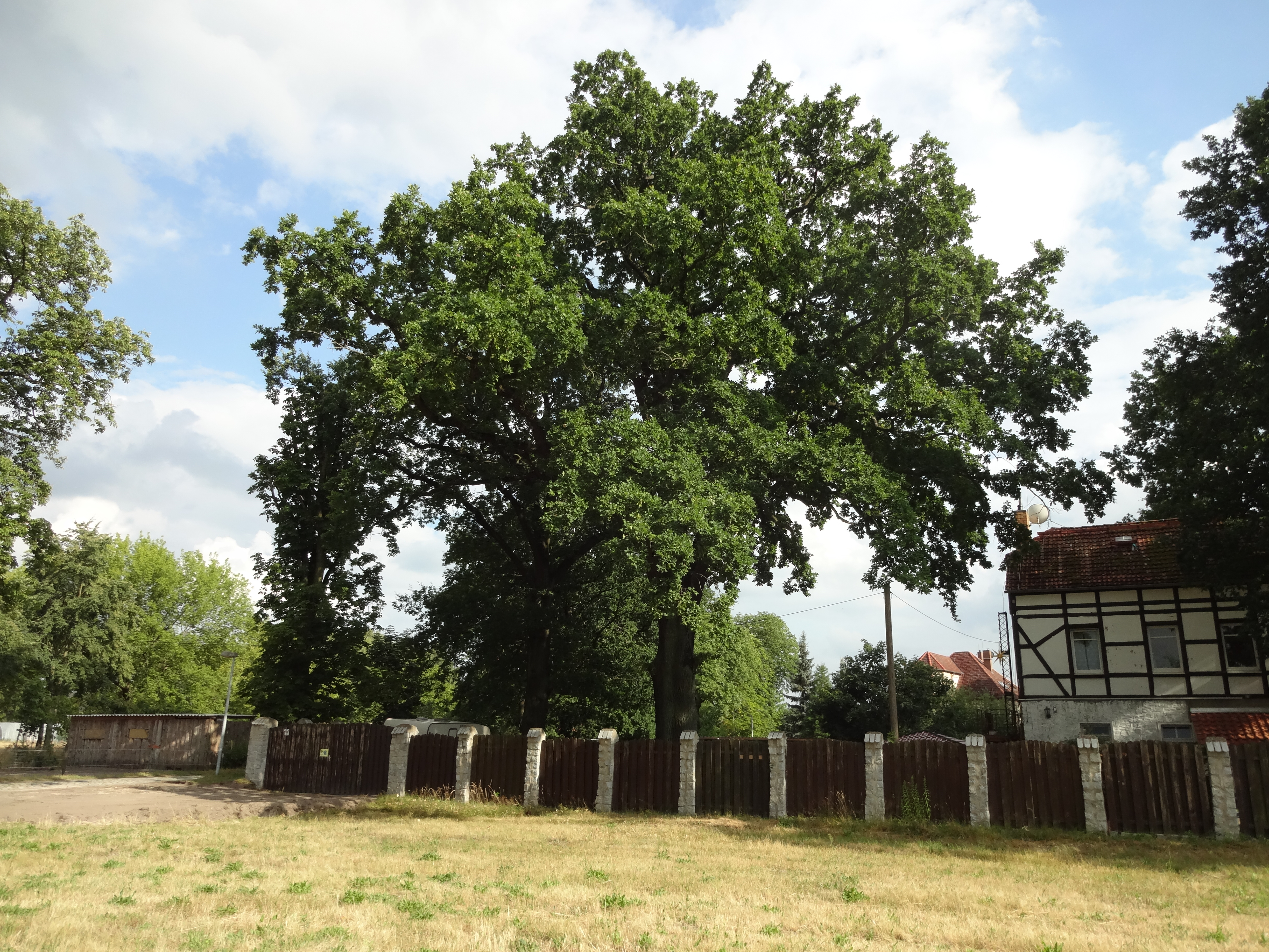 als Naturdenkmal geschützte Stieleiche in der Hauptstraße 27 in Lipten, Baum nordöstlich des Gebäudes